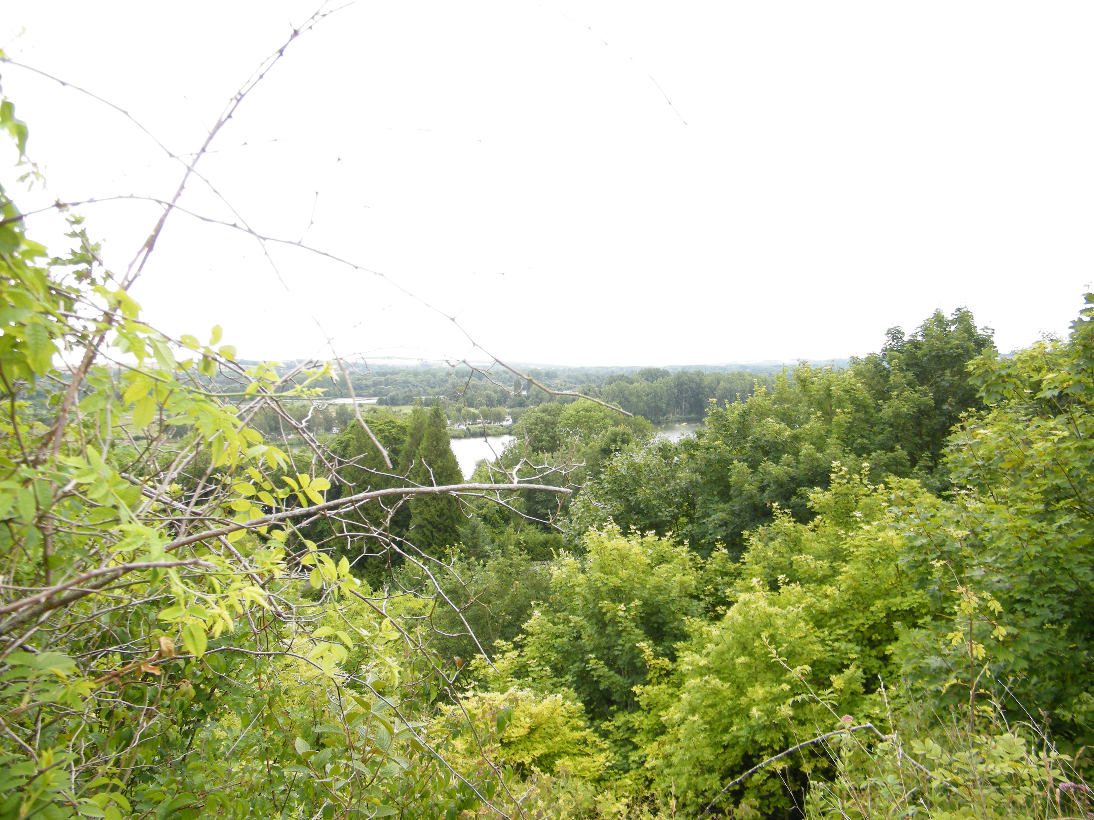 Les étangs, Mareuil-Caubert, Somme, France